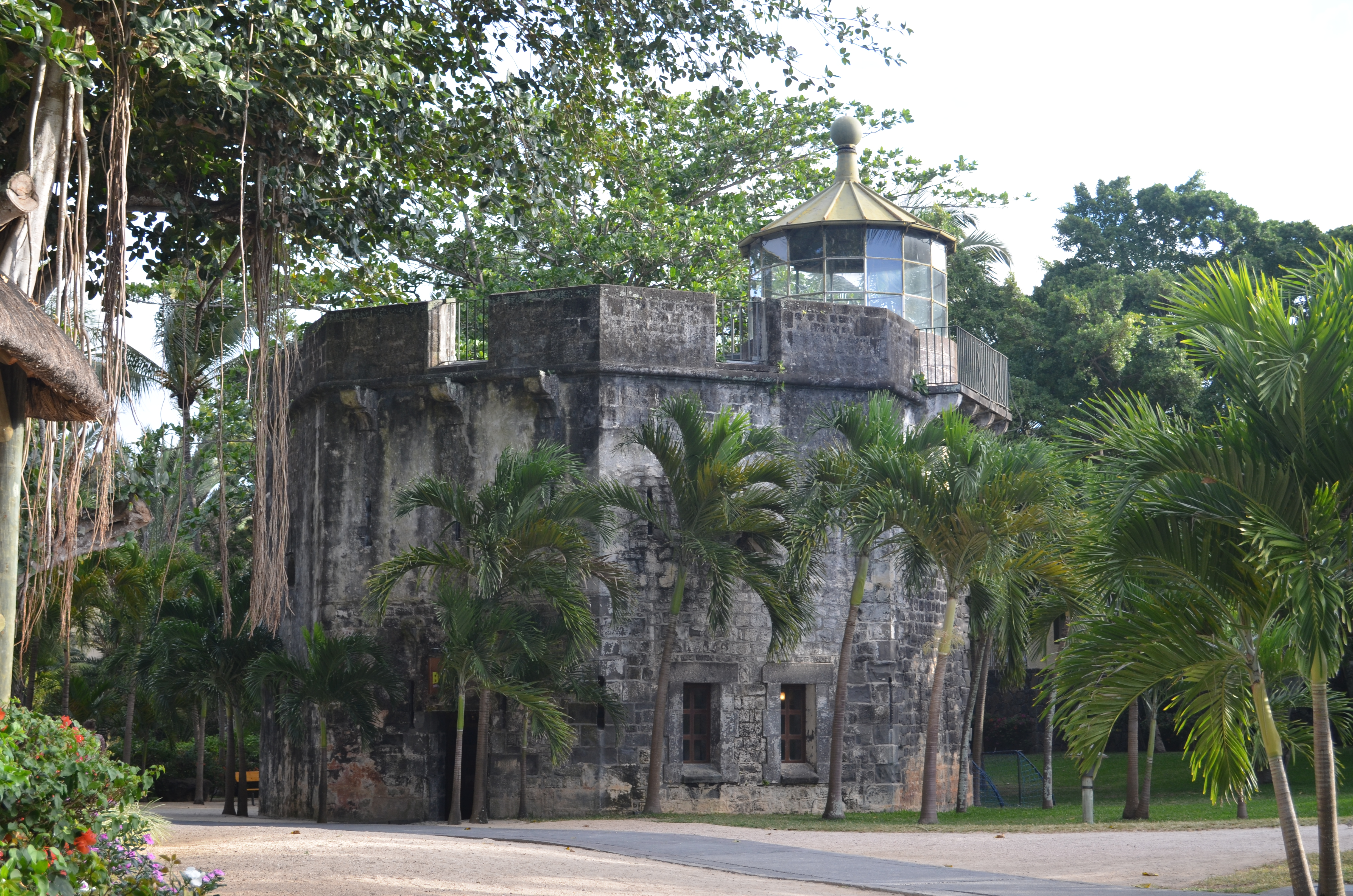 Pointe aux Canonniers, Lighthouse